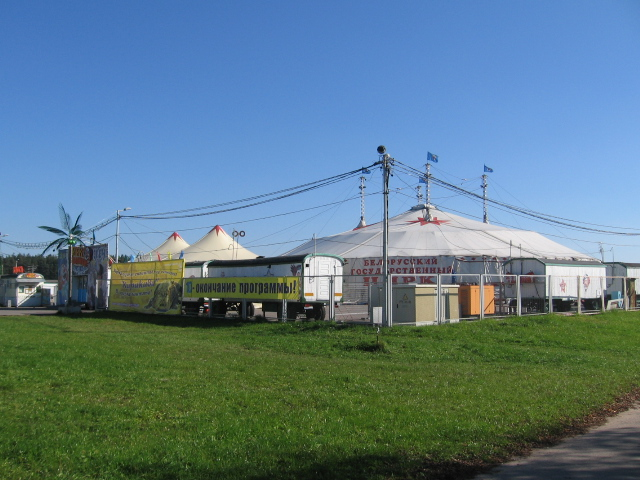 Минский цирк-шапито Белорусского государственного цирка